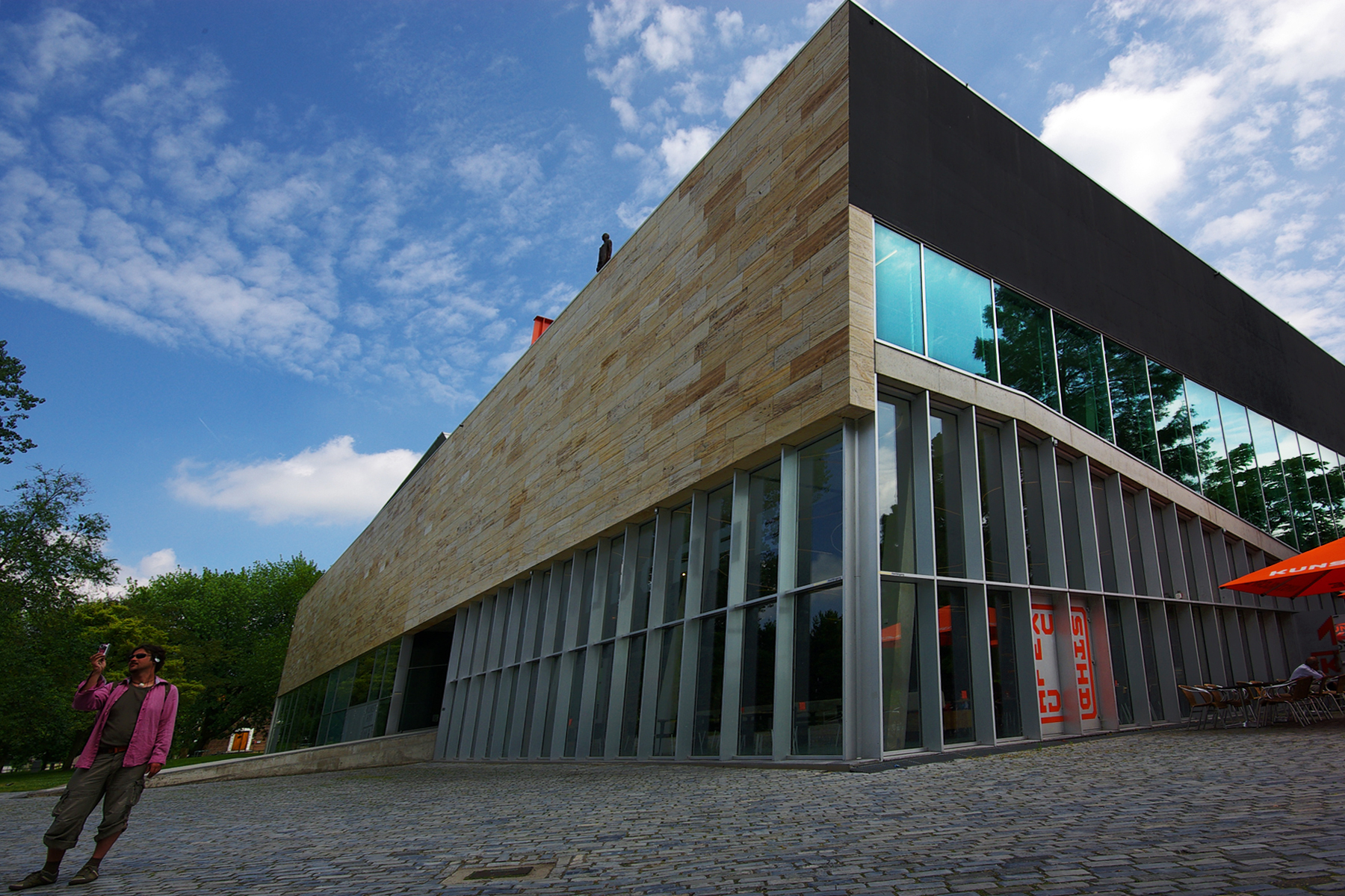 Kunsthal